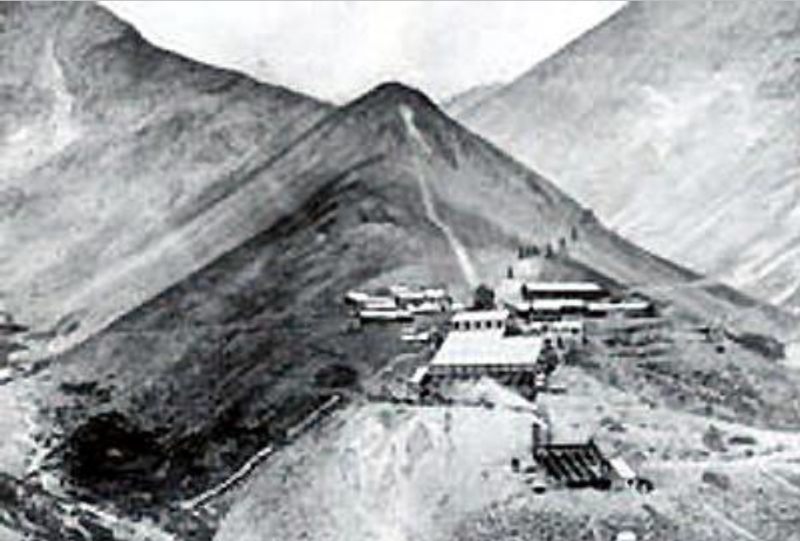 El Teniente: El Molino (Sewell) en 1909